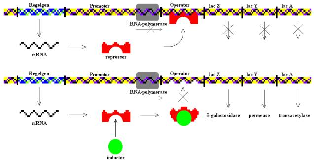 zelf gemaakt